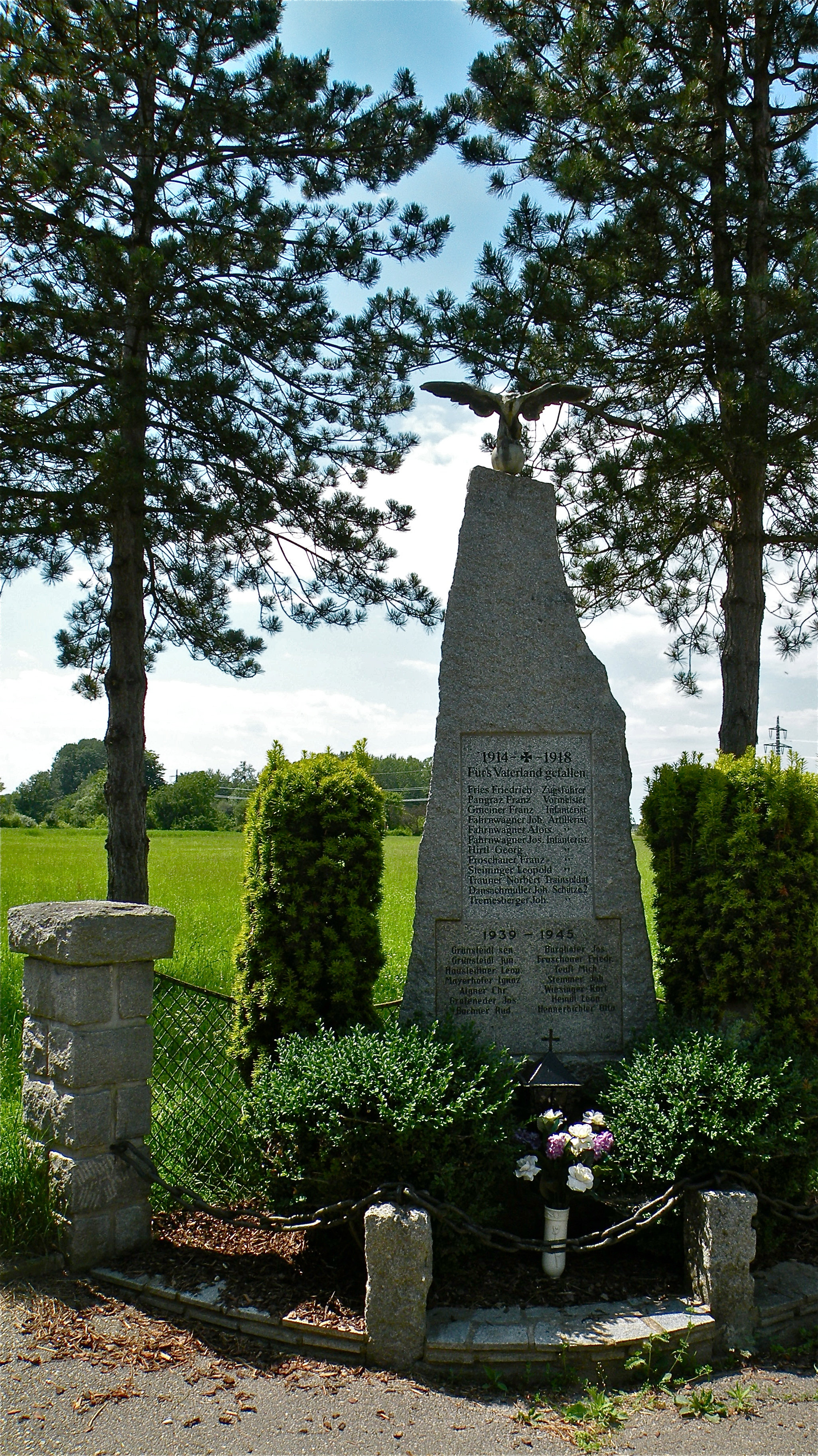 Kriegerdenkmal in Hütting in Mitterkirchen im Machland